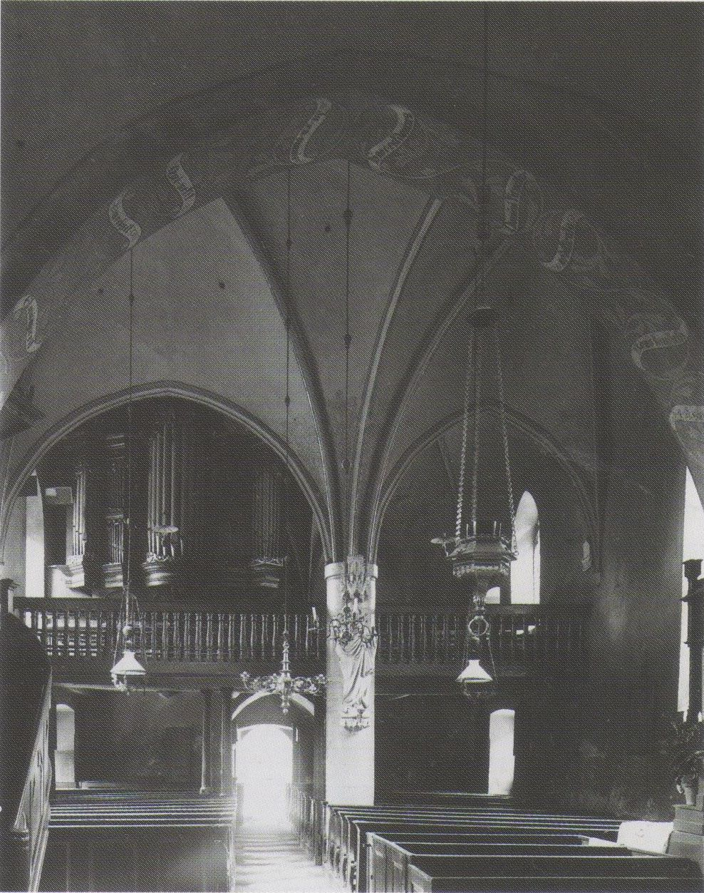 Das Foto zeigt den Innenraum der "Alten Kirche" St. Stephanus in Bockum-Hövel, heute Stadtbezirk von Hamm, im Jahre 1891.